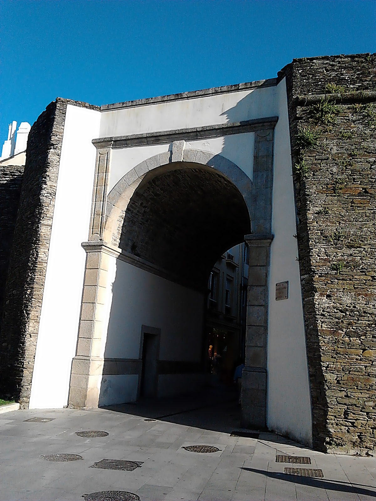 Puerta de San Pedro de la Muralla romana de Lugo